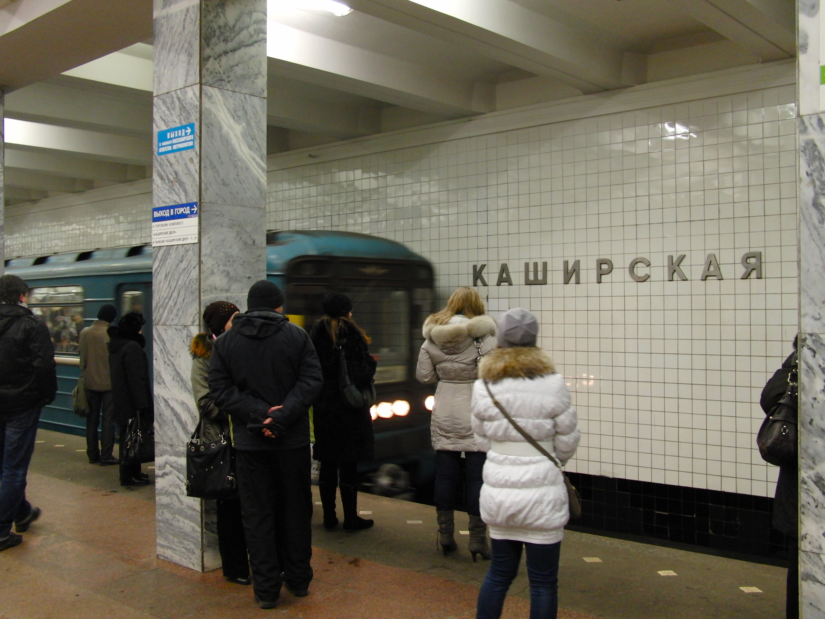 Kashirskaya (Каширская)